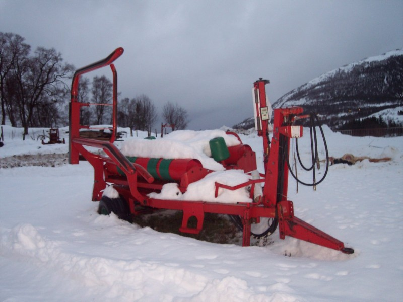 Rundballepakker. Bilde av Thor-Rune Hansen.